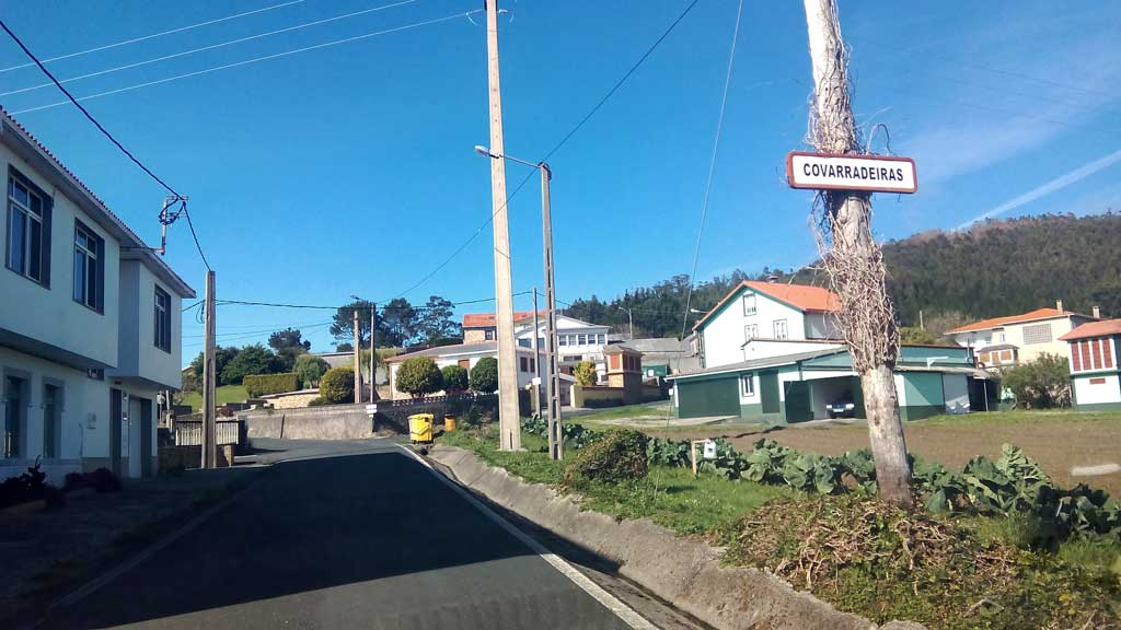 Vista de Covarradeiras, Covas.